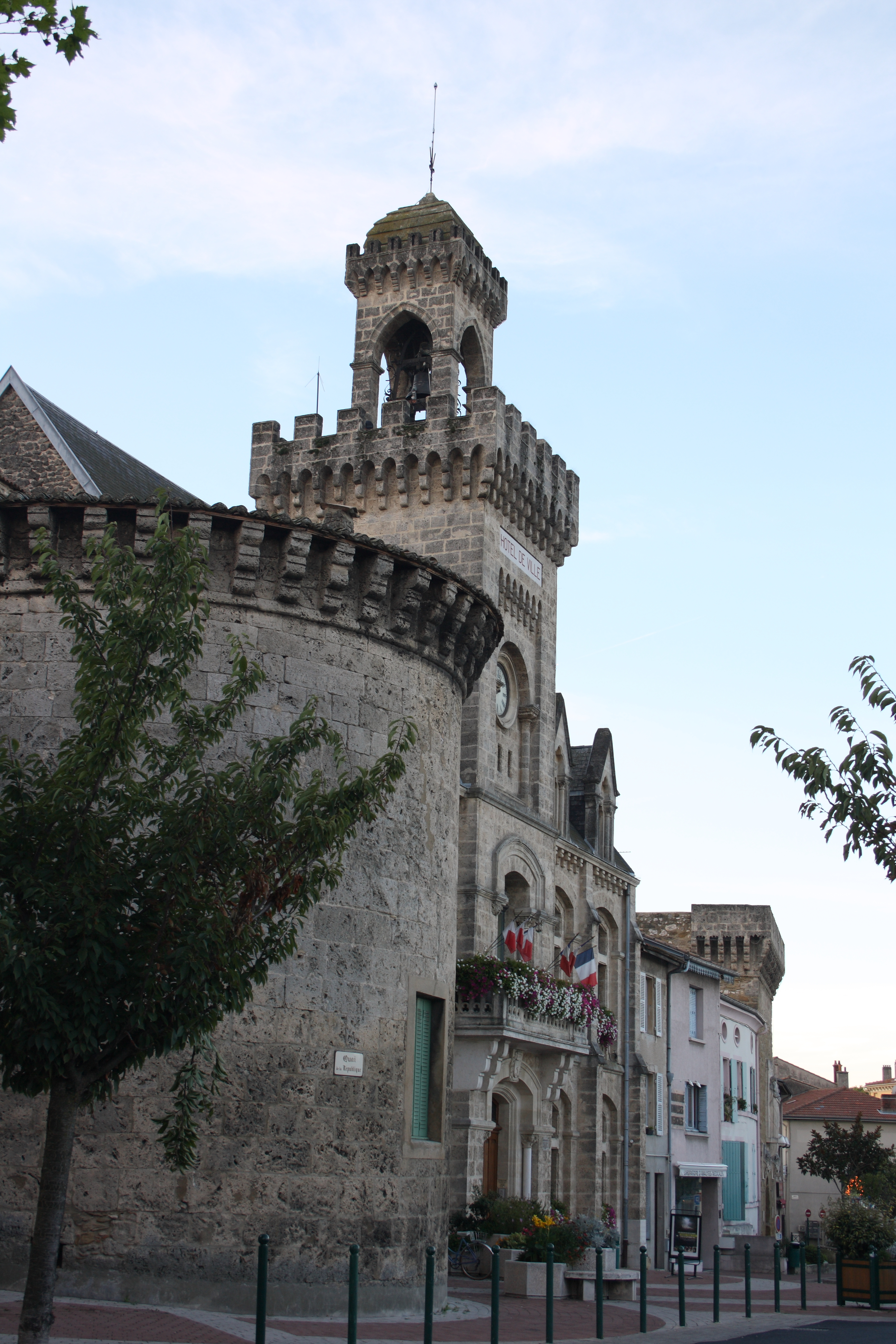 Hôtel de ville in ChabeuilChabeuil